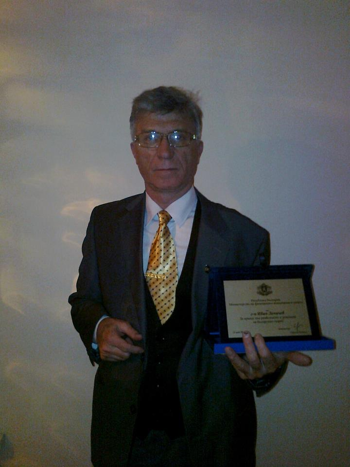 Иван Лепичев